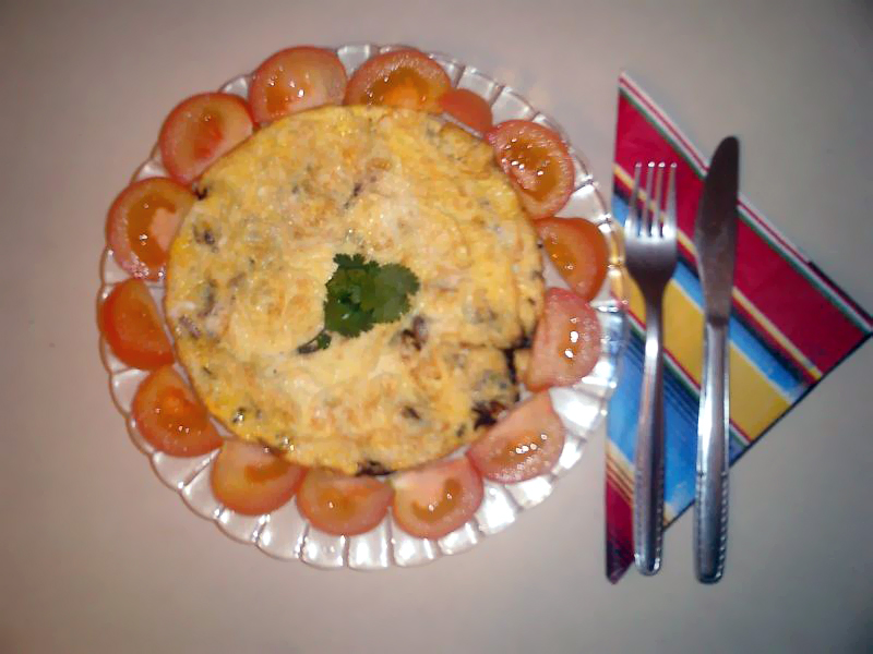 Omlette